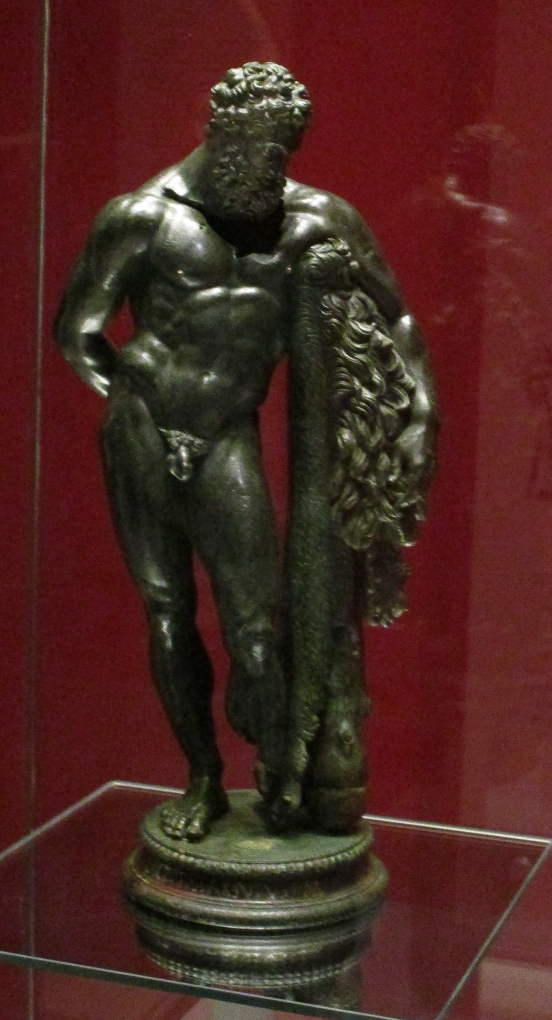 La statua di Ercole a riposo rinvenuto nel santuario sulmonese di Ercole Curino sulle pendici del Monte Morrone e custodito nel Museo archeologico nazionale d'Abruzzo, a Chieti